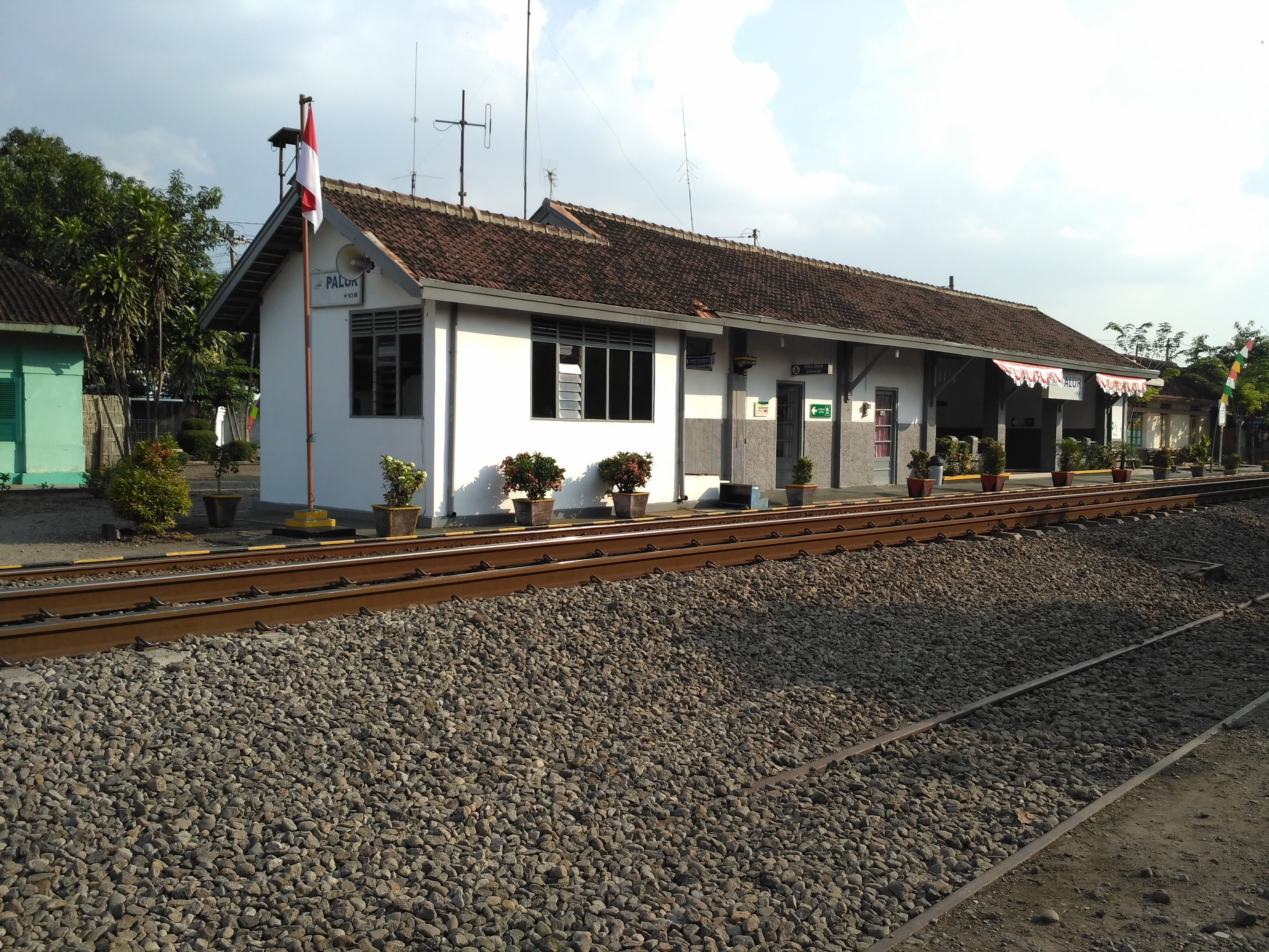 Foto Stasiun Palur saat tahun 2016